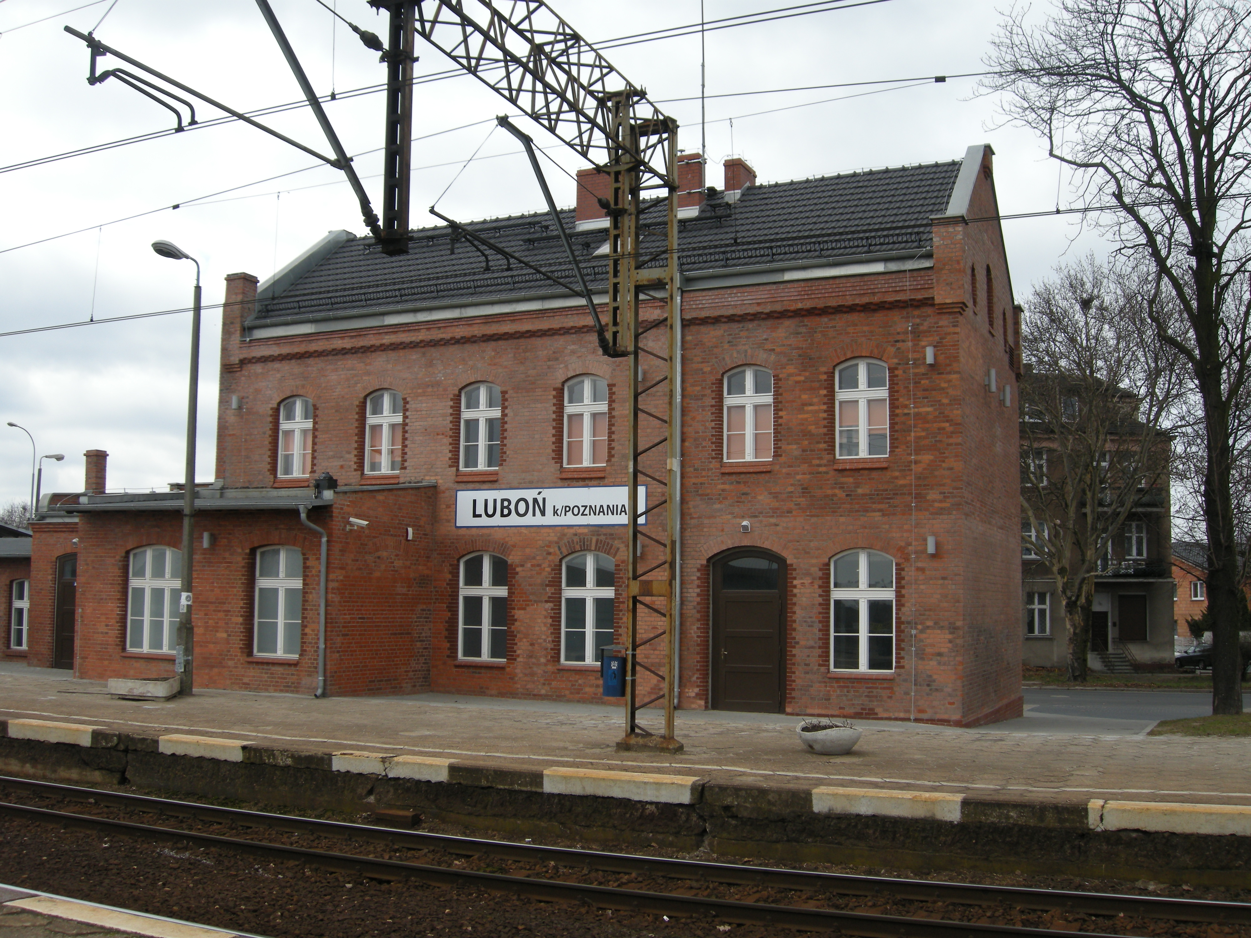 Dworzec kolejowy Luboń koło Poznania. Polska.